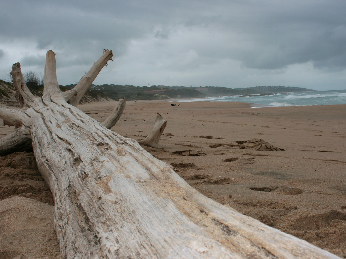 Stump on Trafalgar Beach